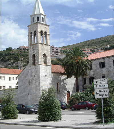 Campanar de Gruz a Dubrovnik, foto propia